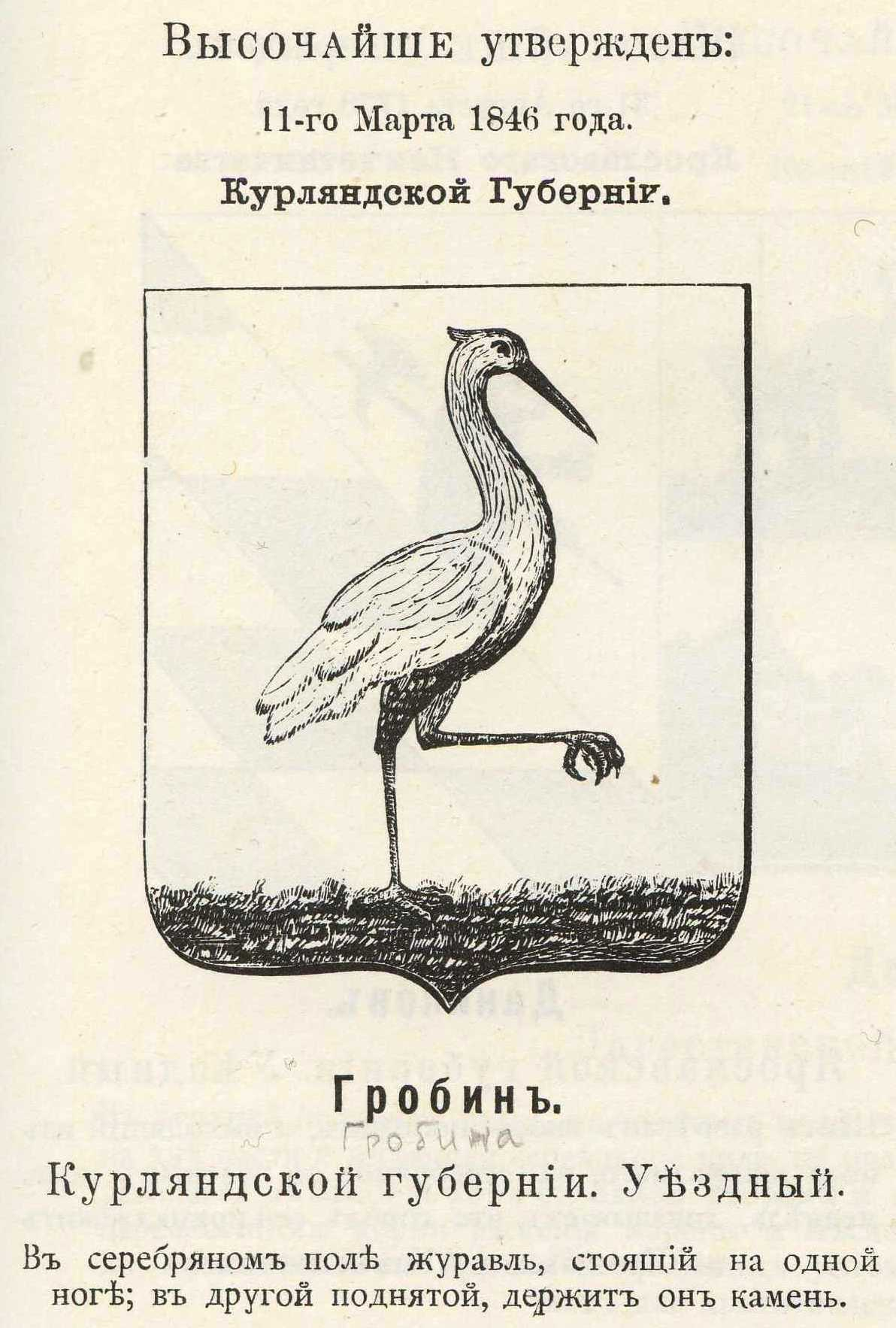 Official Russian Empire coat of arms Grobin. Герб Российской Империи уездного города Гробин Курляндской губернии с официальным описанием в Гербовнике Винклера.